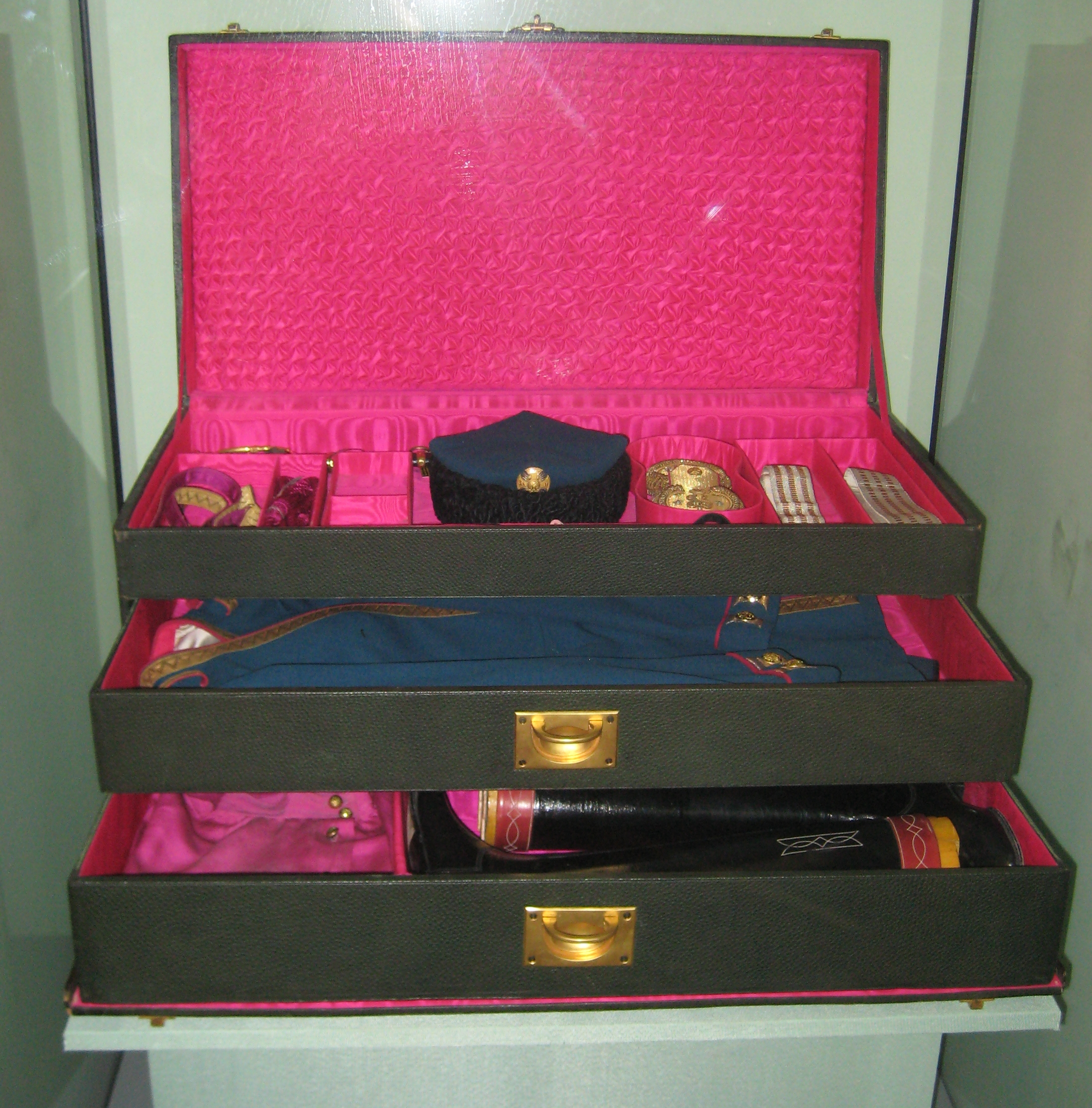 Комплект обмундирования подпоручика лейб-гвардии 4-го стрелкового Императорской фамилии полка: мундир, эполеты, погоны, рубашка-косоворотка, пояс, шаровары, шапка, сапоги. Россия, 1911. Сукно, золотная нить, кожа. Принадлежал наследнику цесаревичу Алексею Николаевичу. ГИМ